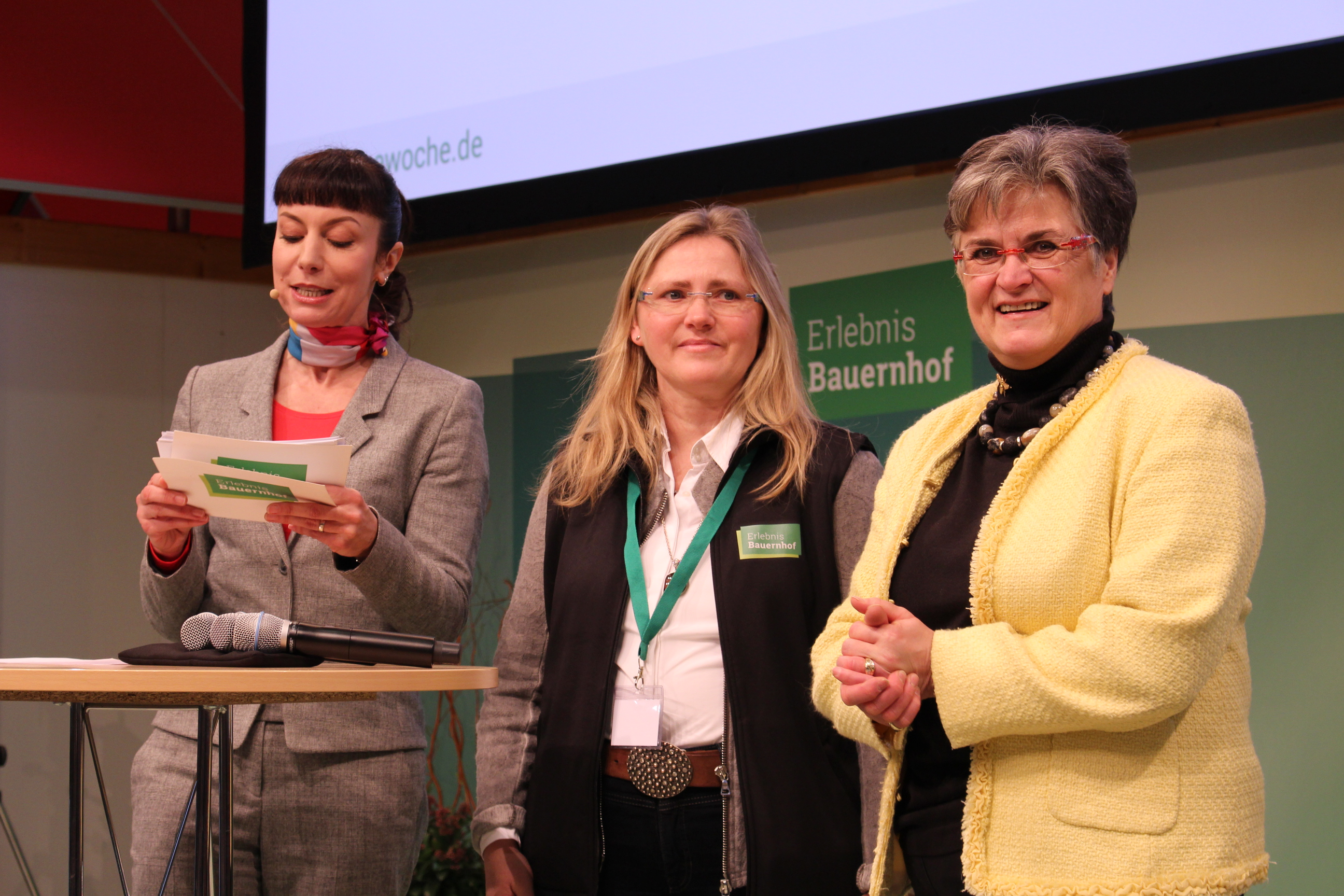 Brigitte Scherb (rechts) mit zwei wieteren Frauen auf Bühne